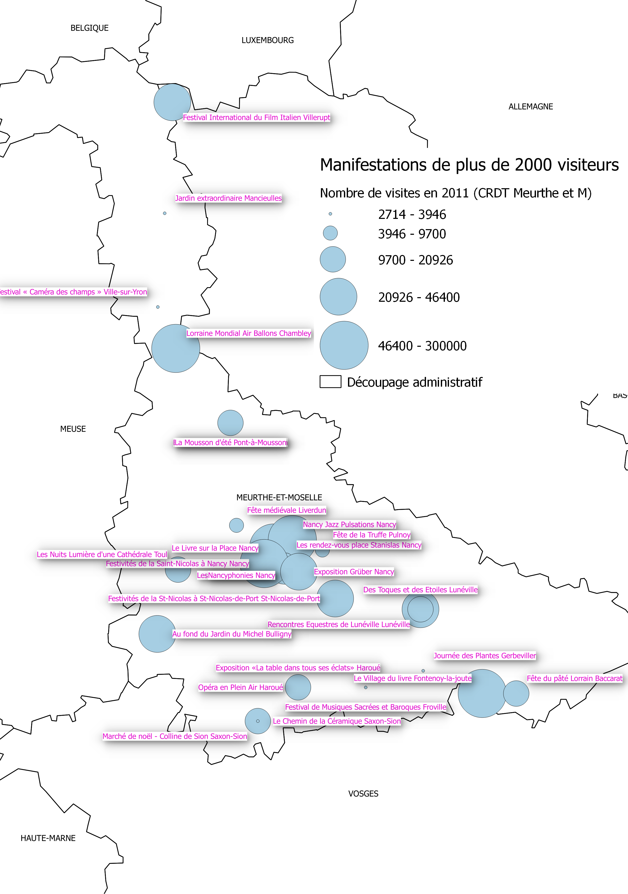 Fréquentation selon les sources des offices de tourisme - Qgis